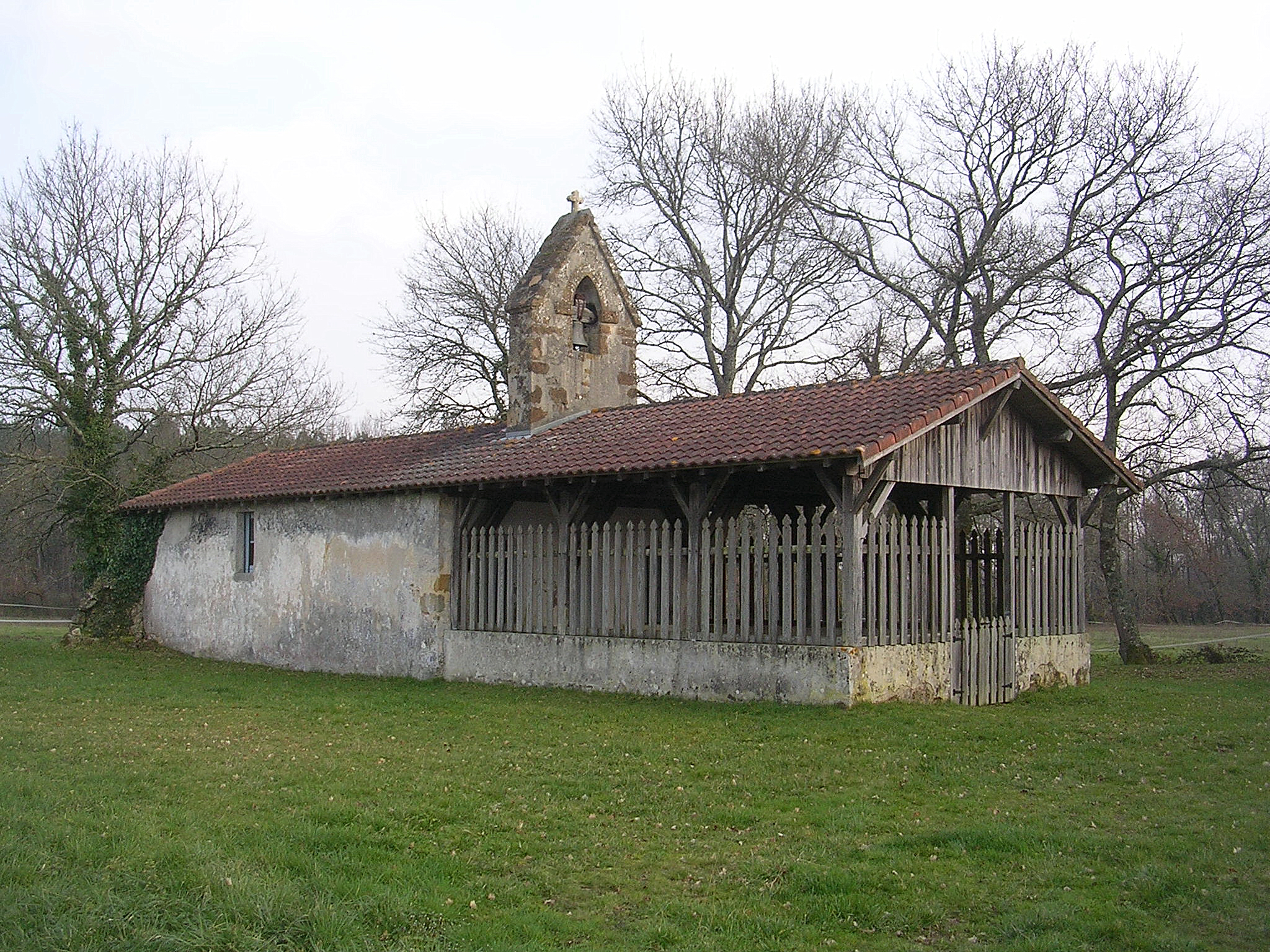 Chapelle Notre-Dame d'Arosse à Ygos-Saint-Saturnin, dans le département français des Landes